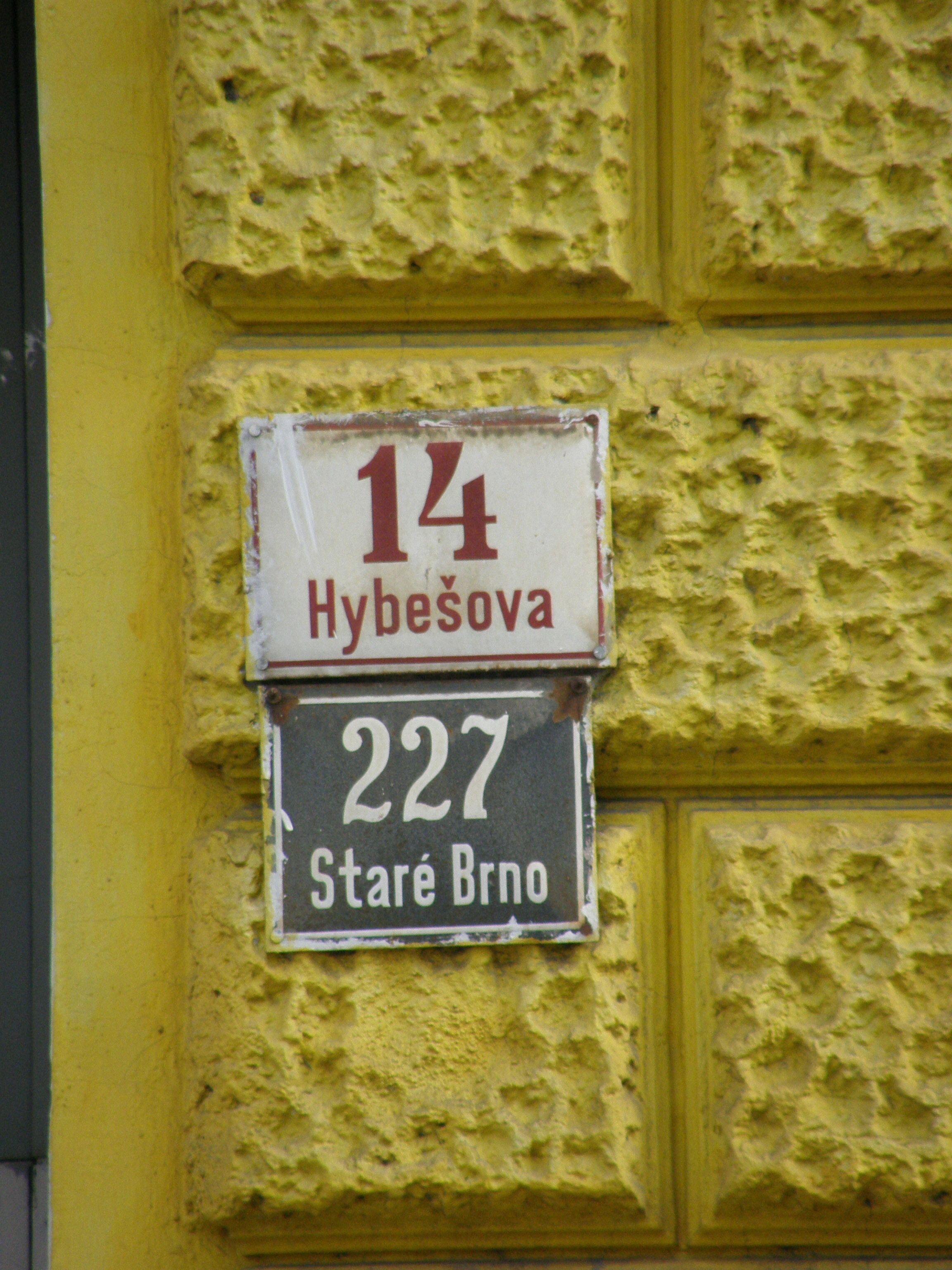 Domovní čísla - Brno, ulice Hybešova